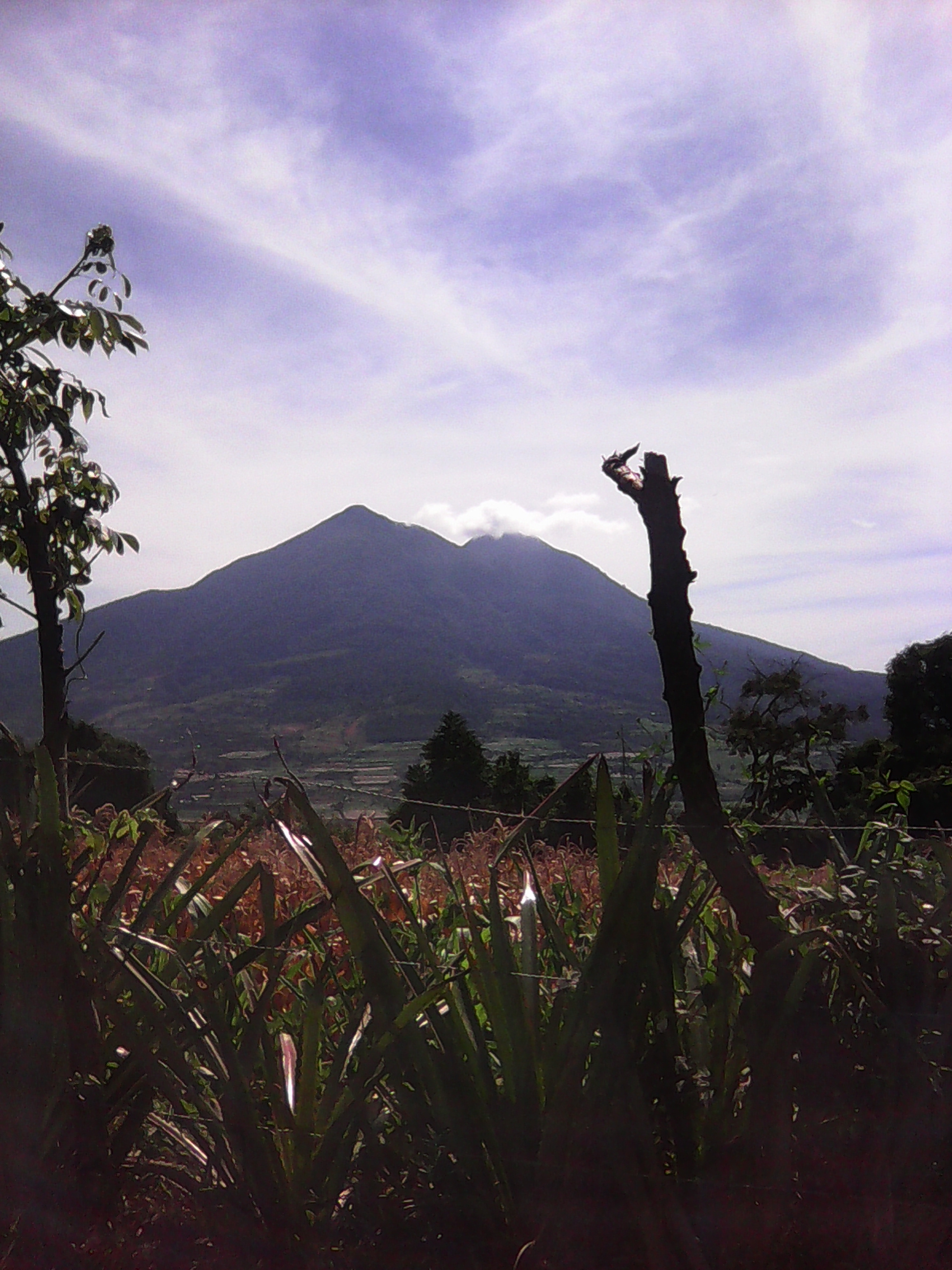 Vista al volcan de San Vicente desde el Cerro Grande